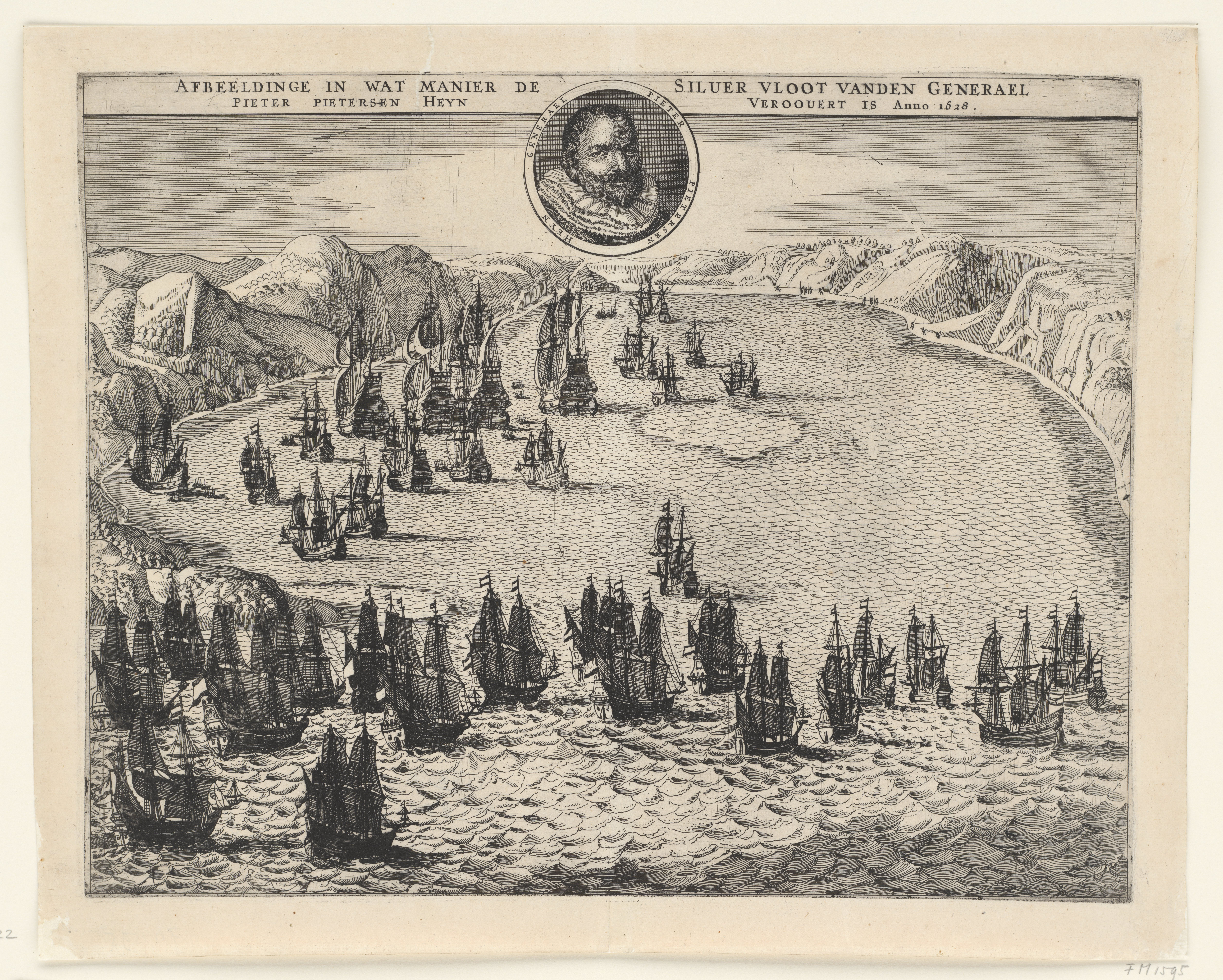 IdentificatieTitel(s): Verovering van de Zilvervloot in de Baai van Matanzas door admiraal Piet Heyn, 1628Afbeeldinge in wat manier de Silver vloot vanden Generael Pieter Pietersen Heyn veroovert is Anno 1628 (titel op object)Objecttype: prent historieprent Objectnummer: RP-P-1960-322Catalogusreferentie: FMH 1595Hollstein Dutch 64Opmerking: deze kopie niet vermeldOmschrijving: Verovering van de Zilvervloot in de Baai van Matanzas door een vloot van de WIC onder bevel van admiraal Piet Heyn, 8 september 1628. Bovenaan een rond portret van admiraal Piet Heyn.VervaardigingVervaardiger: prentmaker: anoniemnaar prent van: Claes Jansz. Visscher (II)Plaats vervaardiging: Noordelijke NederlandenDatering: 1651 - 1652Fysieke kenmerken: etsMateriaal: papier Techniek: etsenAfmetingen: plaatrand: h 272 mm × b 347 mmToelichtingGebruikt als illustratie in: I. Commelin, Frederick Hendrick van Nassauw prince van Orangien zyn leven en bedryf, Wed. Esdras Willemsz Snellaert en Gerrit Nieuwenhuysen, Utrecht 1652, fol. 45 (?). Spiegelbeeldige kopie naar de prent in de uitgave van Jodocus Janssonius van 1651 (FMH 1595).OnderwerpWat: ships (in general) (+ propulsion of vehicle, ship, etc. by wind)Verovering van de ZilvervlootWanneer: 1628-09-08 - 1628-09-08Waar: Baai van MatanzasWie: Pieter Pietersz. HeynVerwerving en rechtenVerwerving: aankoop 1960Copyright: Publiek domein